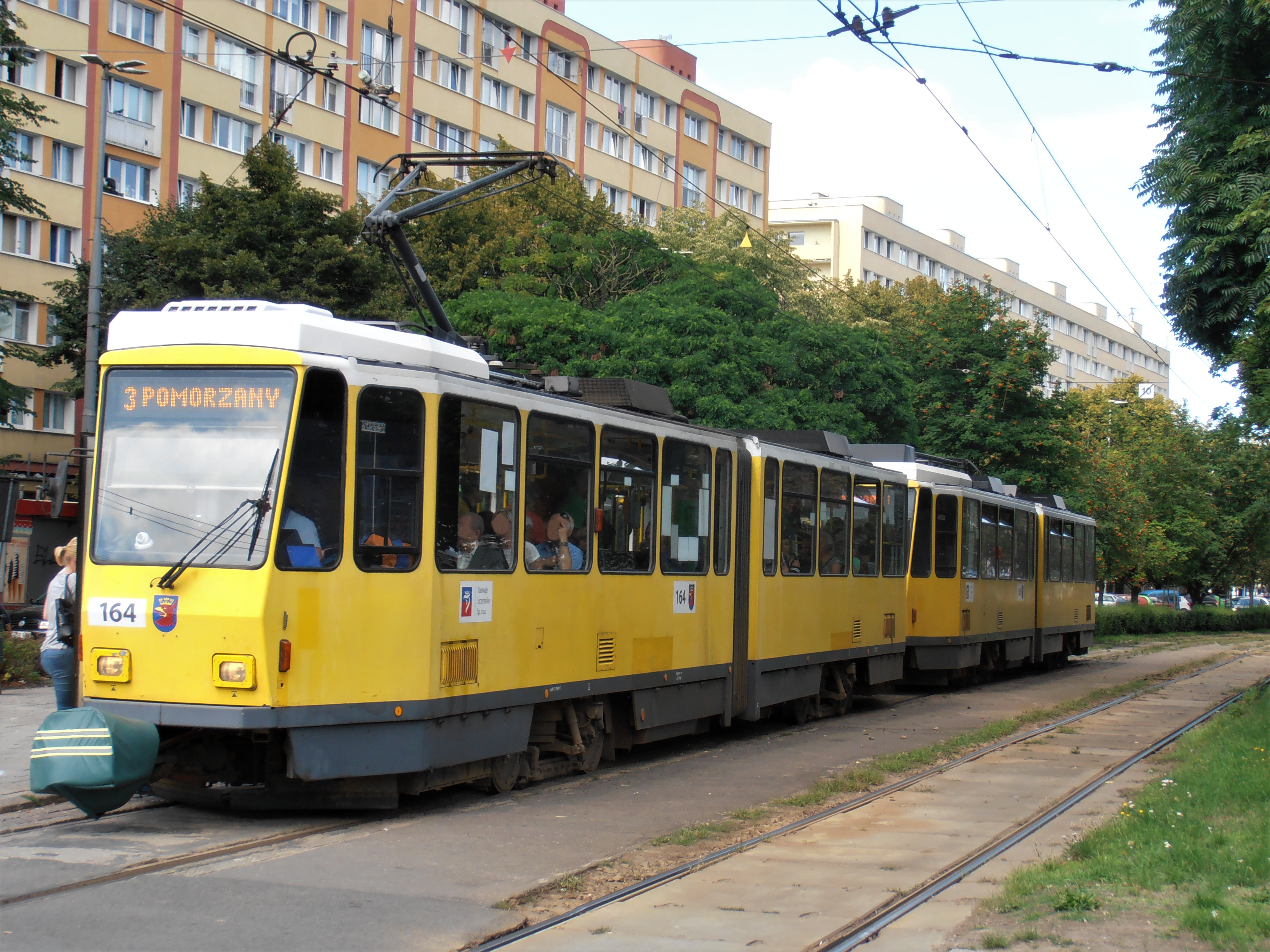 Skład wagonów typu Tatra KT4DtM na placu Rodła w Szczecinie, 2018